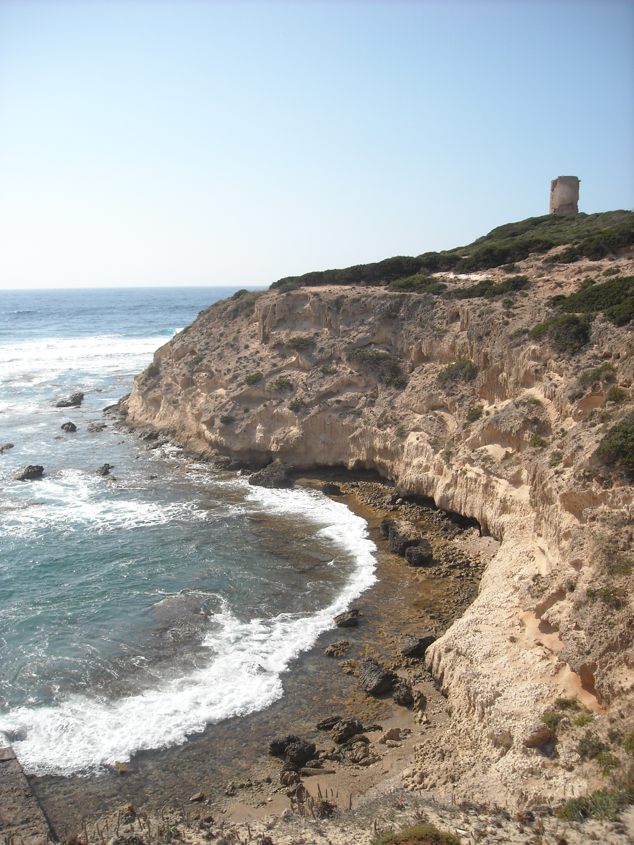 Scogliera di Capo Mannu con torre aragonese, nella penisola del Sinis, Sardegna Sardu: Cabu Mannu, in sa penisula de su Sinnis